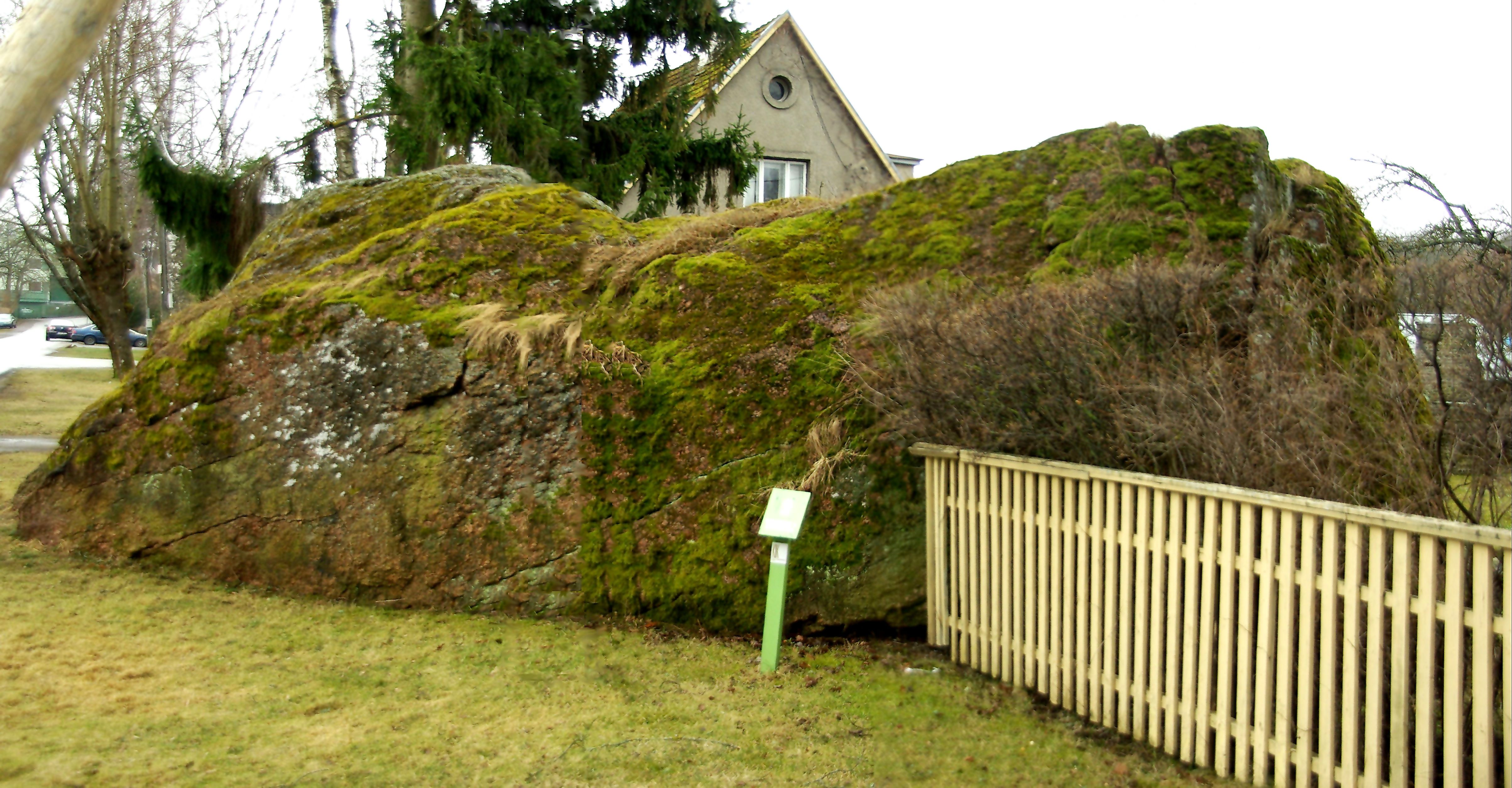 Kuradisadul, hiidrahn Harju maakonnas Tallinnas Pirita linnaosas